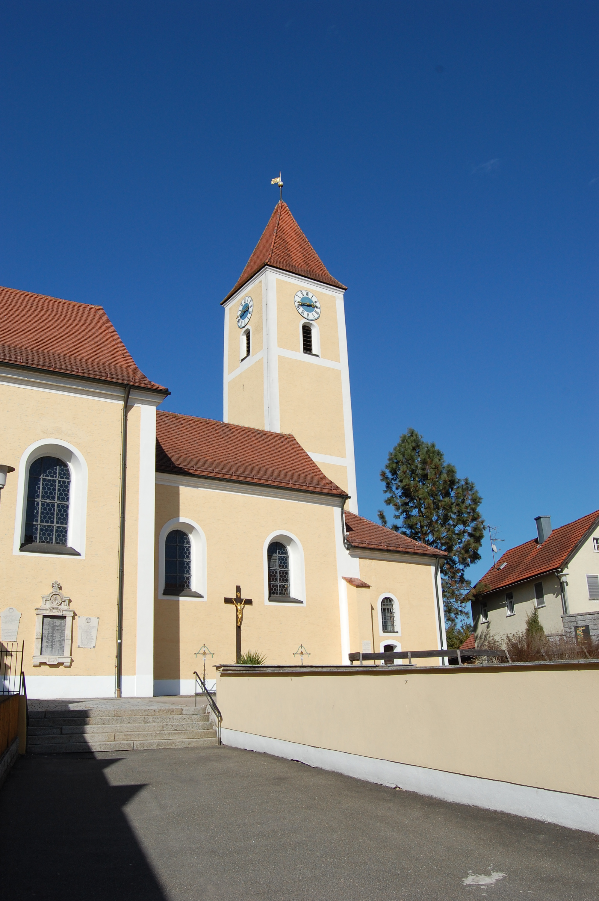 Pfarrkirche Altendorf, Landkreis Schwandorf (2010)